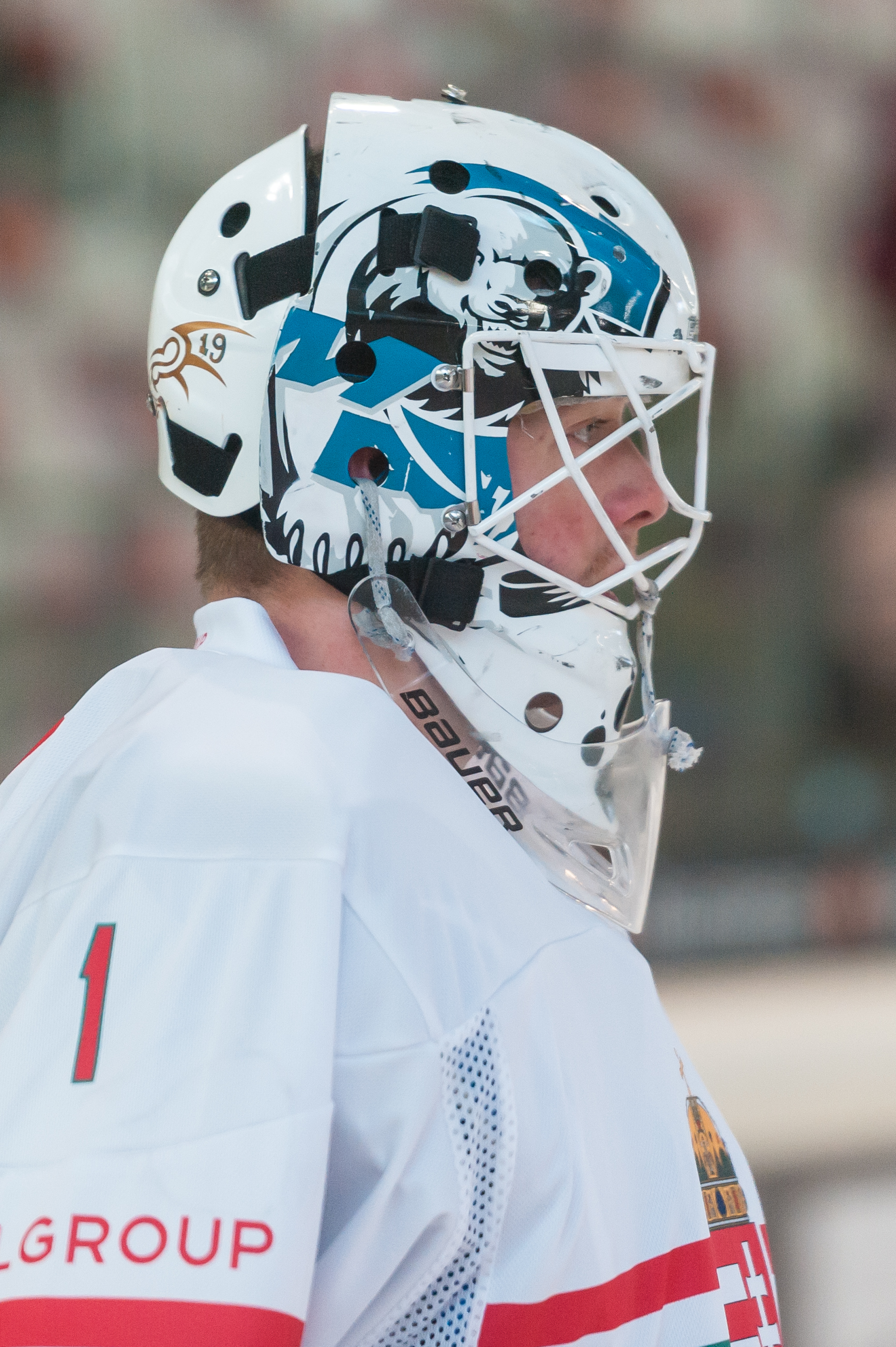 Freundschaftliches Eishockey-Laenderspiel - Oesterreich vs Ungarn. Bild zeigt Bence Balizs (HUN).